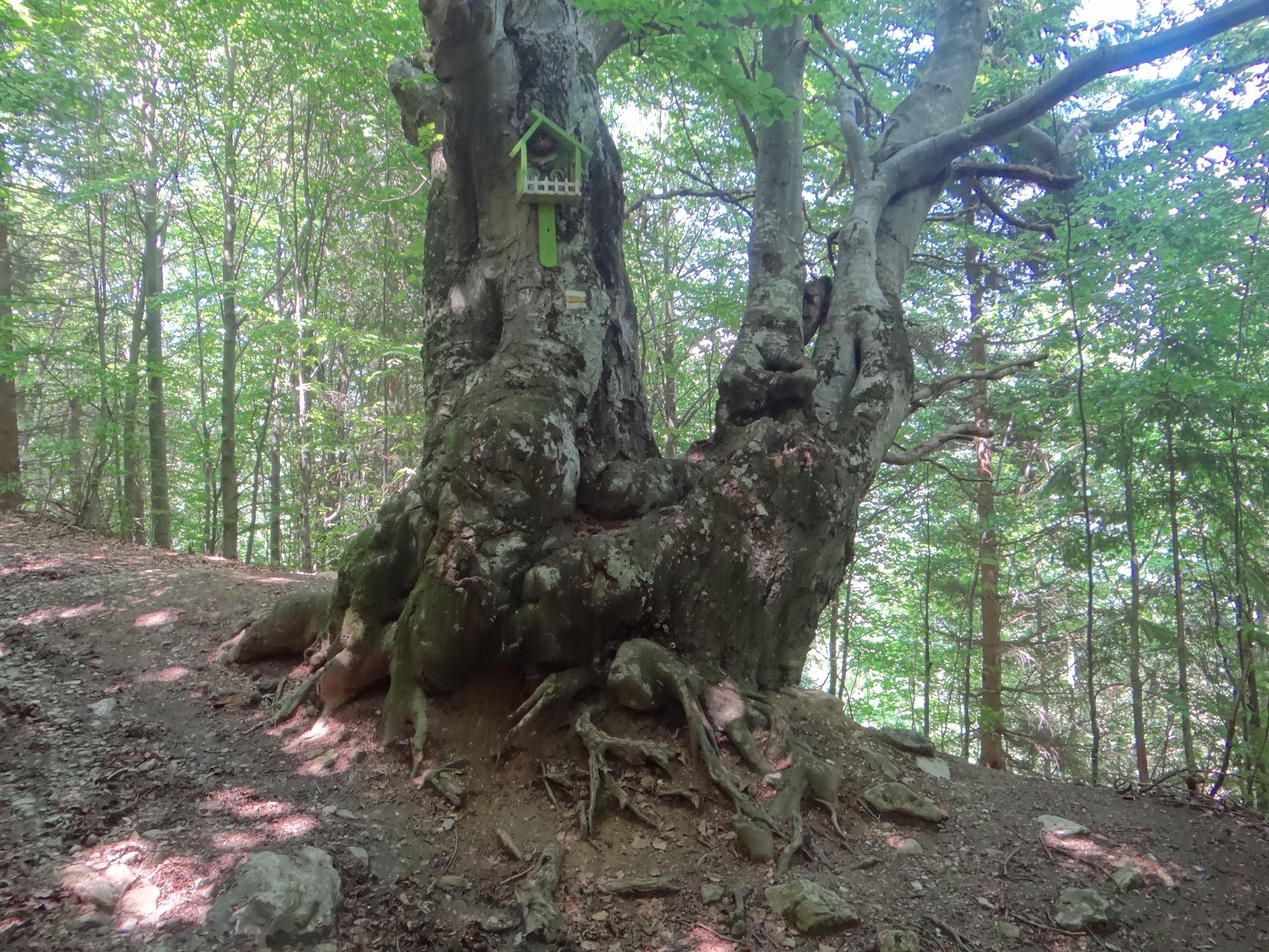 Buk na grzbiecie Magury przy żółtym szlaku ze wsi Liptovské Revúce na Sedlo Ploskej